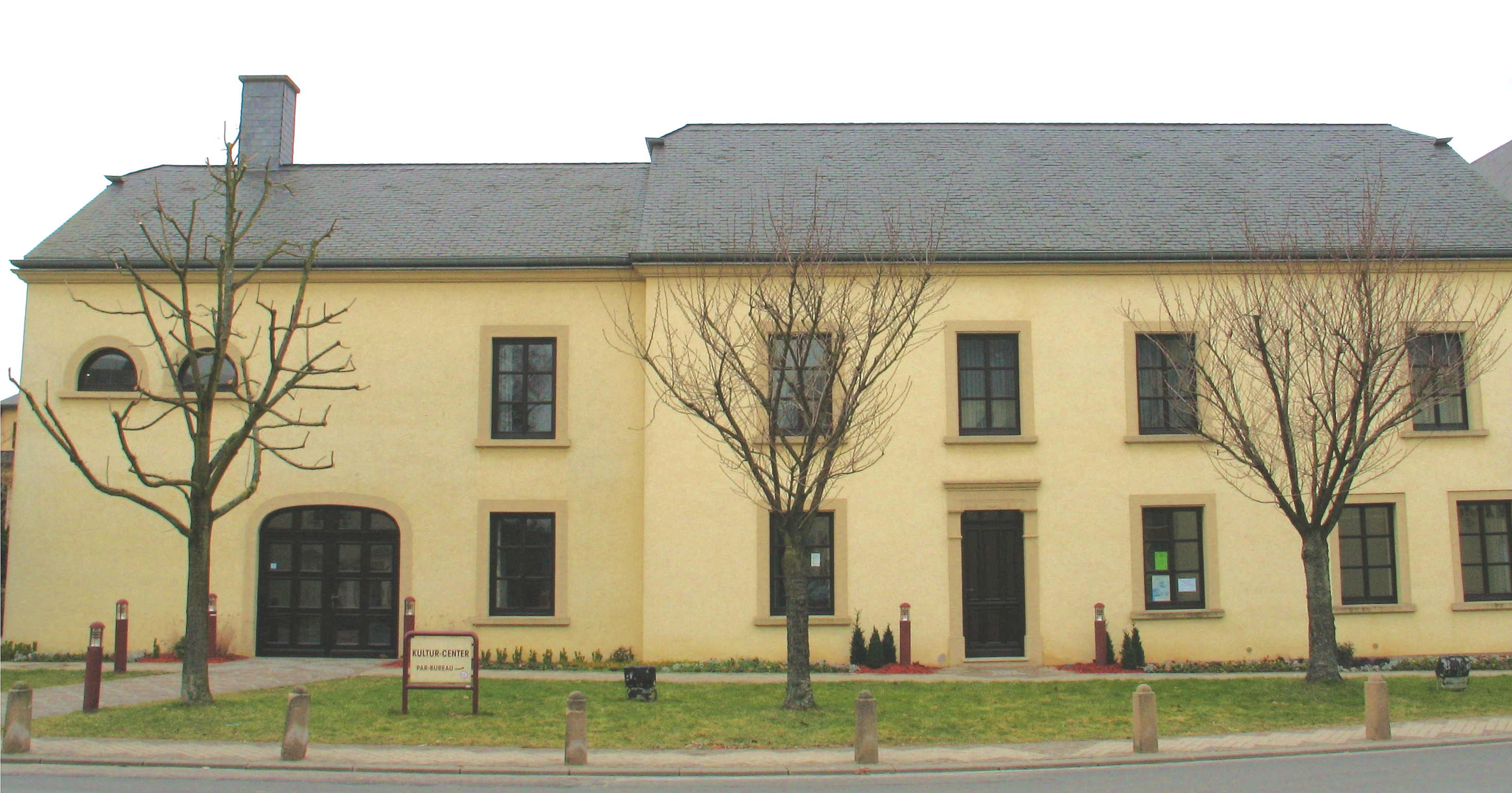 De Kulturcenter zu Béiweng